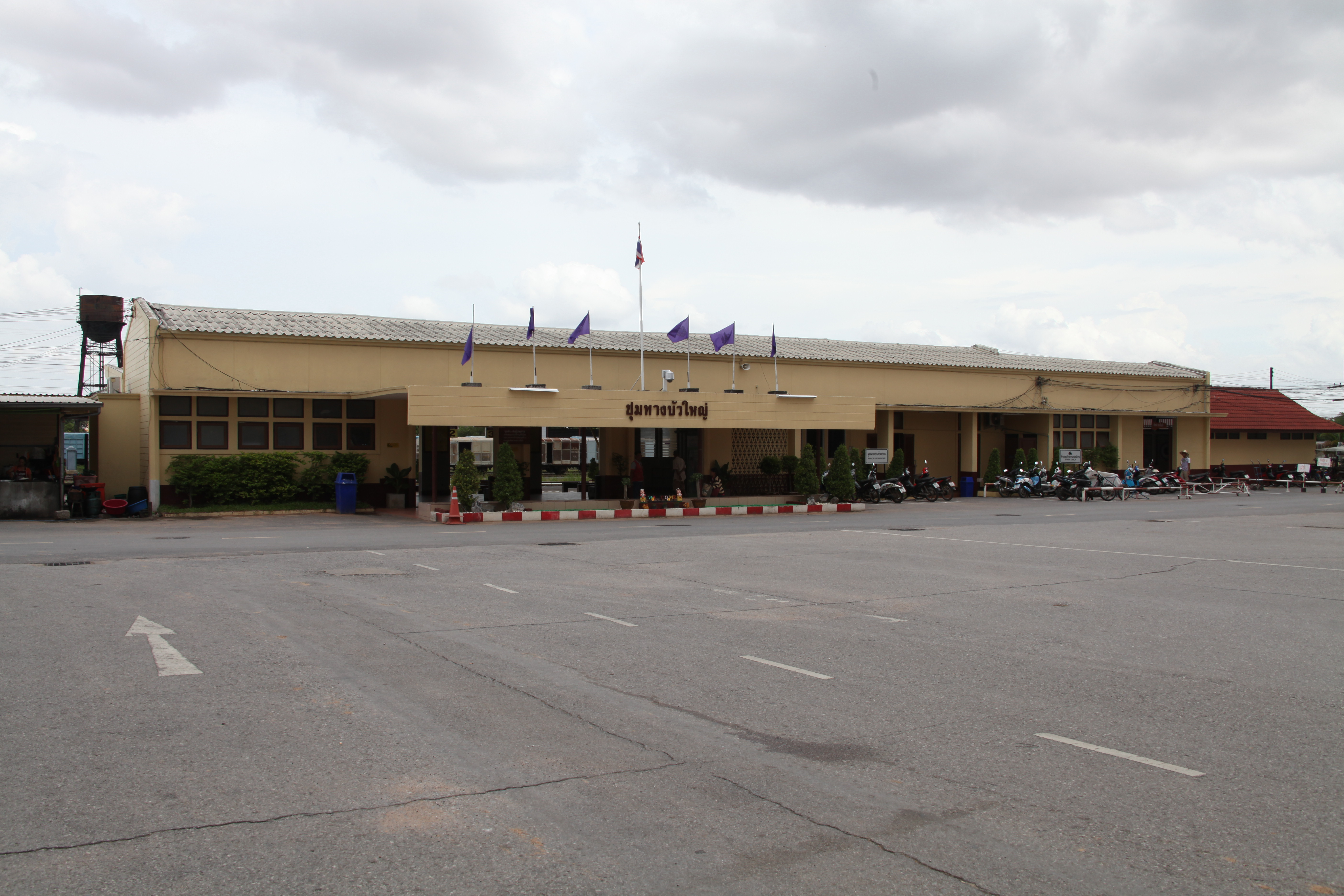 ブワヤイ駅